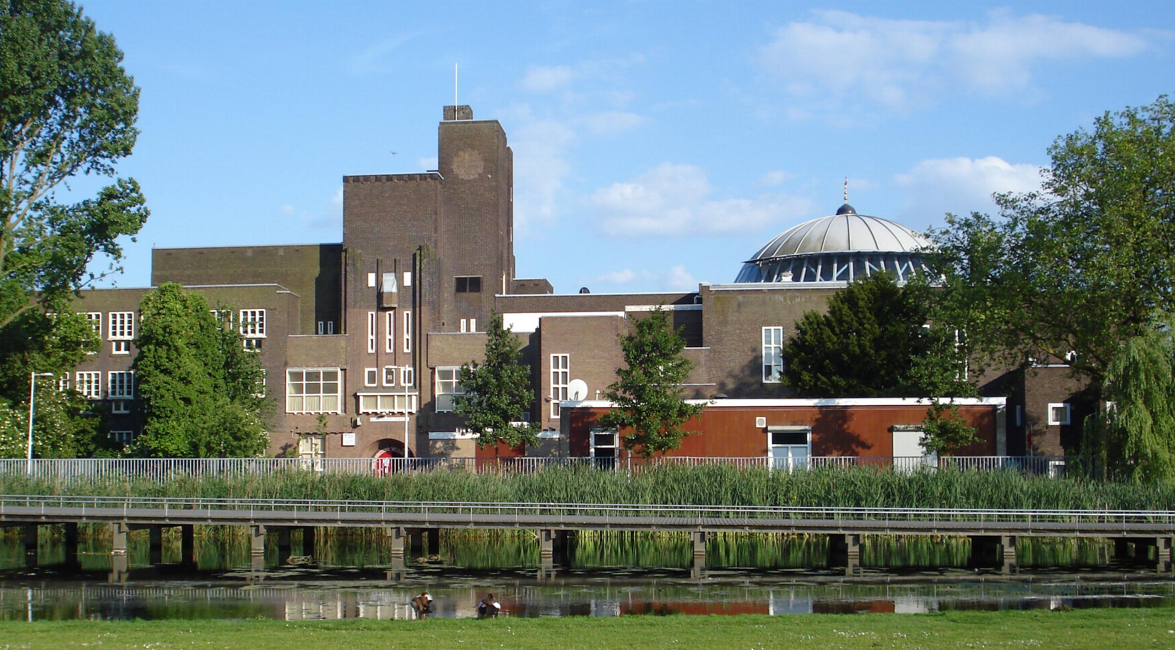 Rotterdam, Afrikaanderplein 40. Rijksmonument.